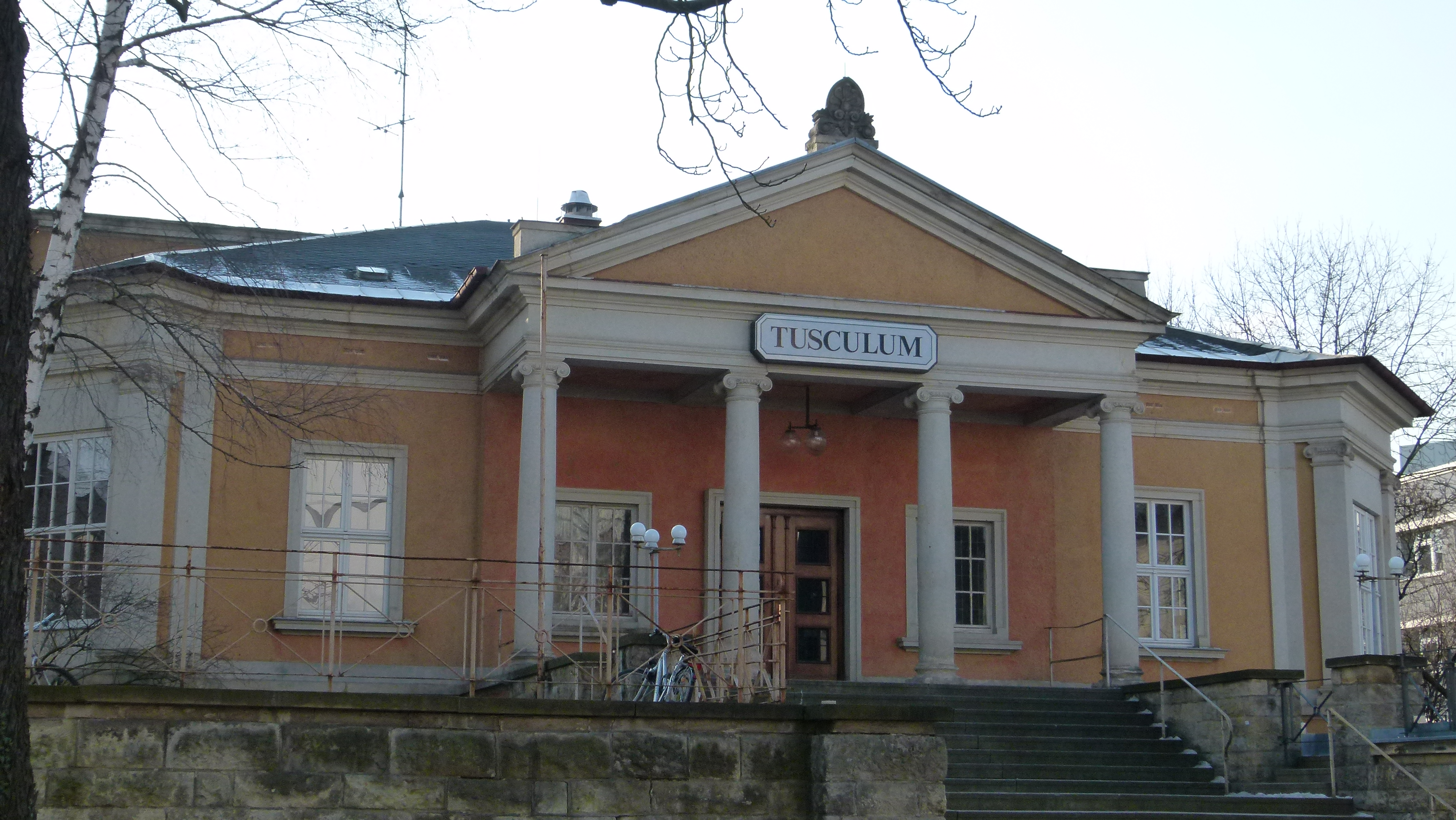 Denkmalgeschütztes Haus, August-Bebel-Straße 12, Strehlen, Dresden